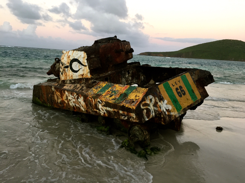 Alte, verlassene Panzer auf Culebra - Puerto Rico